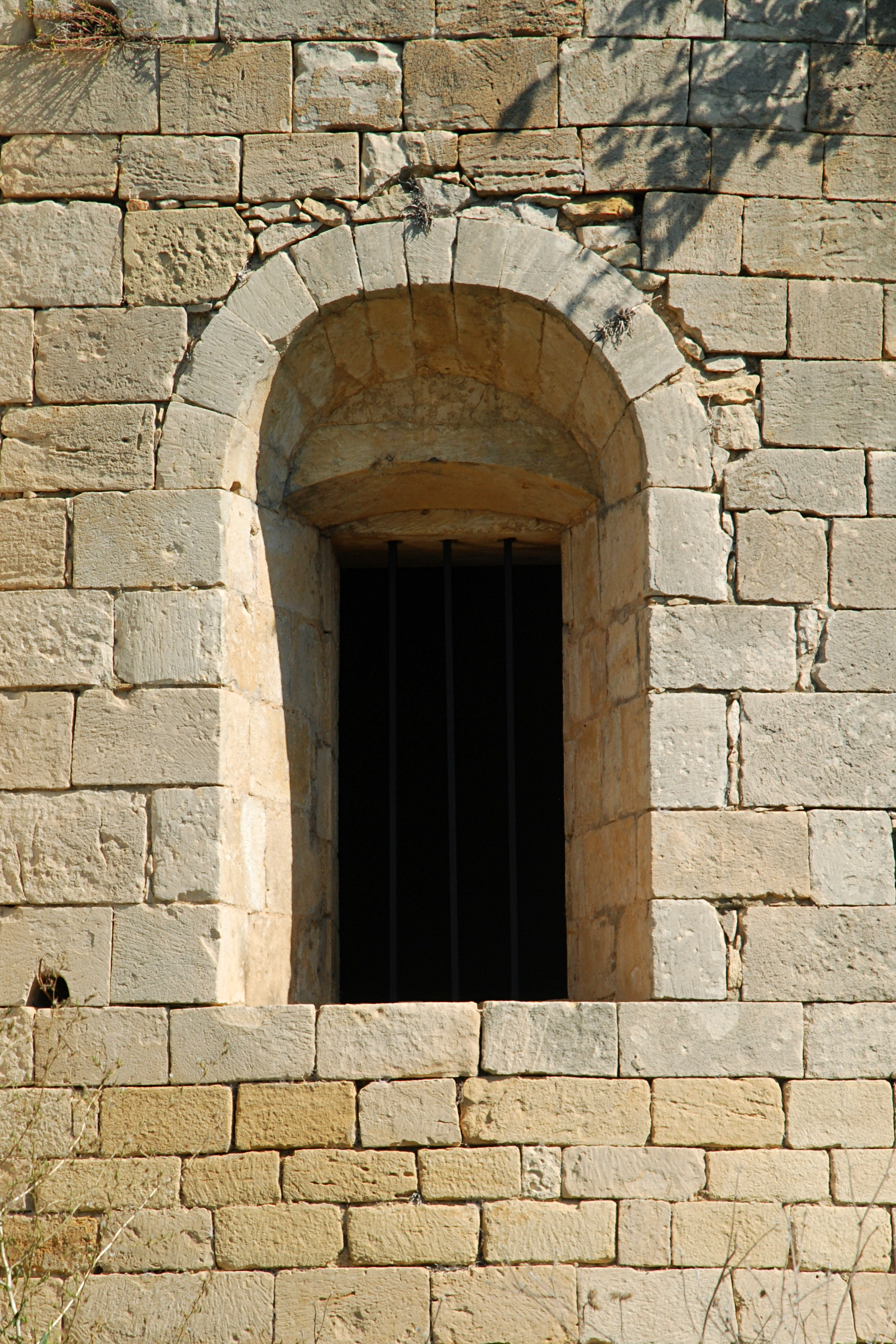 France - Gard - Bagnols-sur-Cèze - Chapelle Saint-Thyrse de Maransan